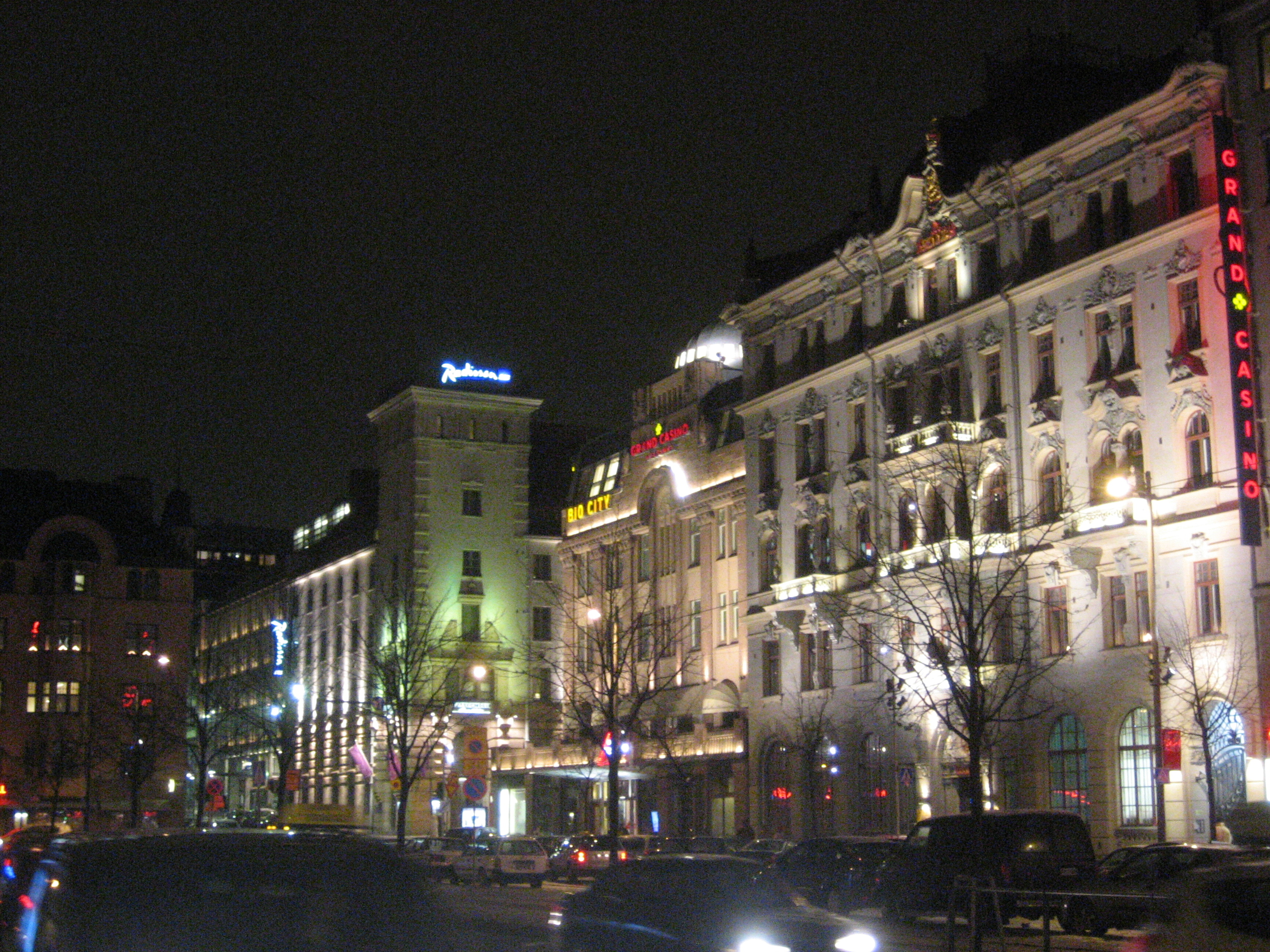 Fennia-korttelia Helsingin Rautatientorin itälaidalla, vasemmalla viereisen korttelin Radisson SAS -hotelli. Tammikuu 2006.